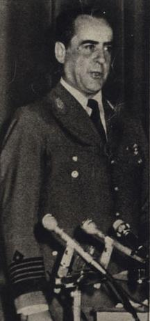 Brigadier General Orlando Ramón Agosti.